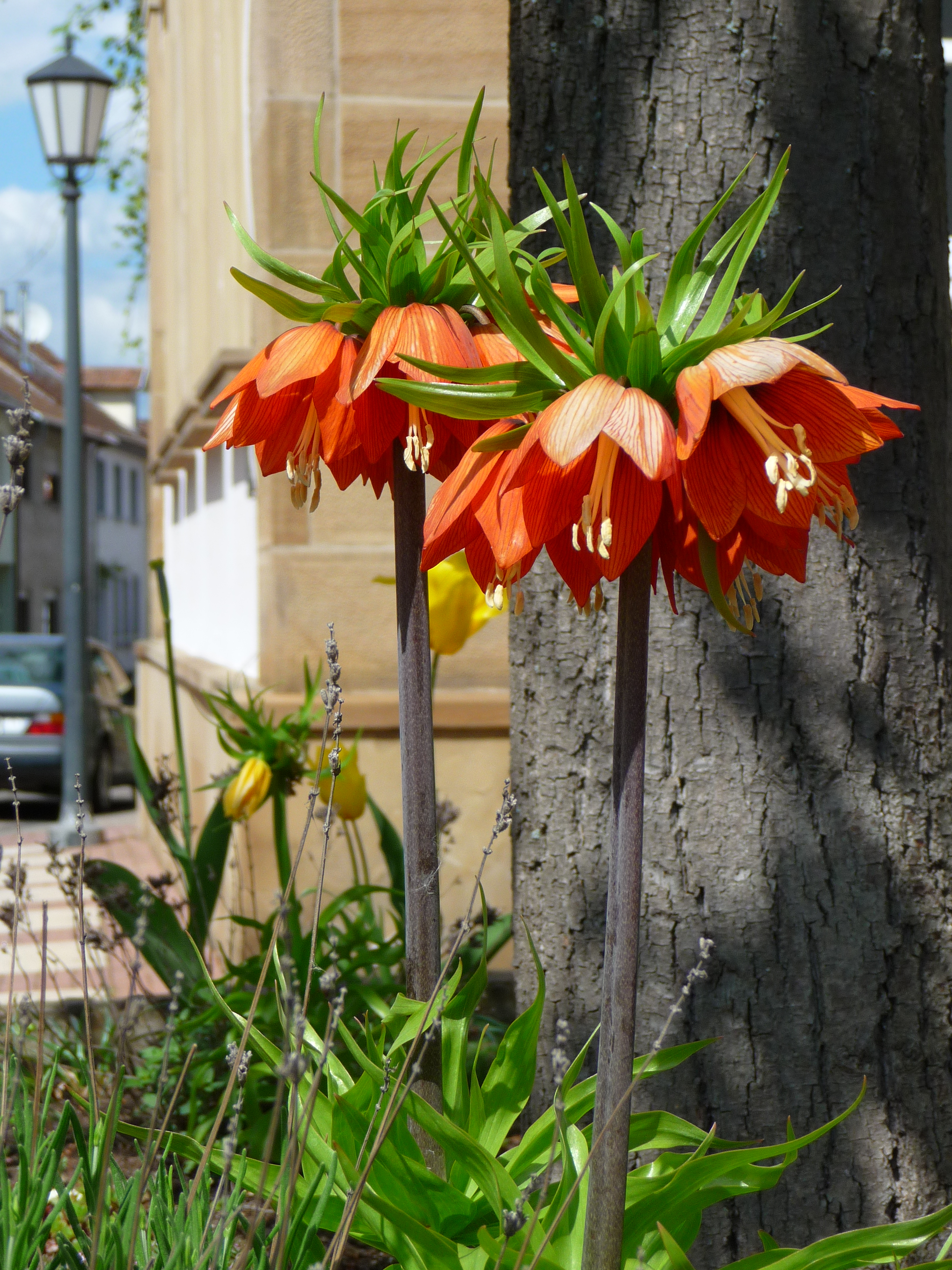 Kaiserkrone (Fritillaria imperialis), fotografiert im nördlichen Baden-Württemberg (Deutschland)